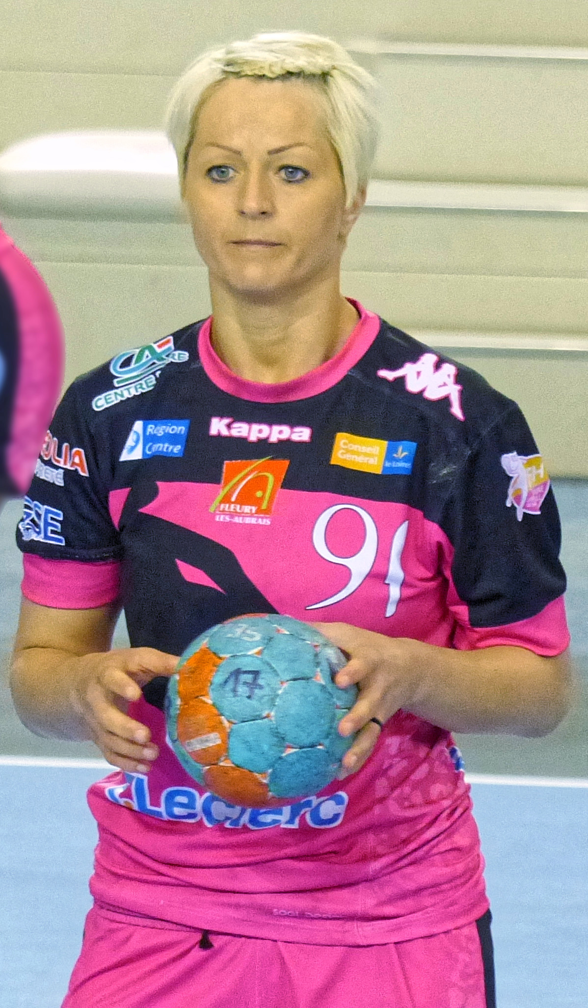 Ionela Stanca pivot du club Fleury Handball. Le 14 mai 2014.